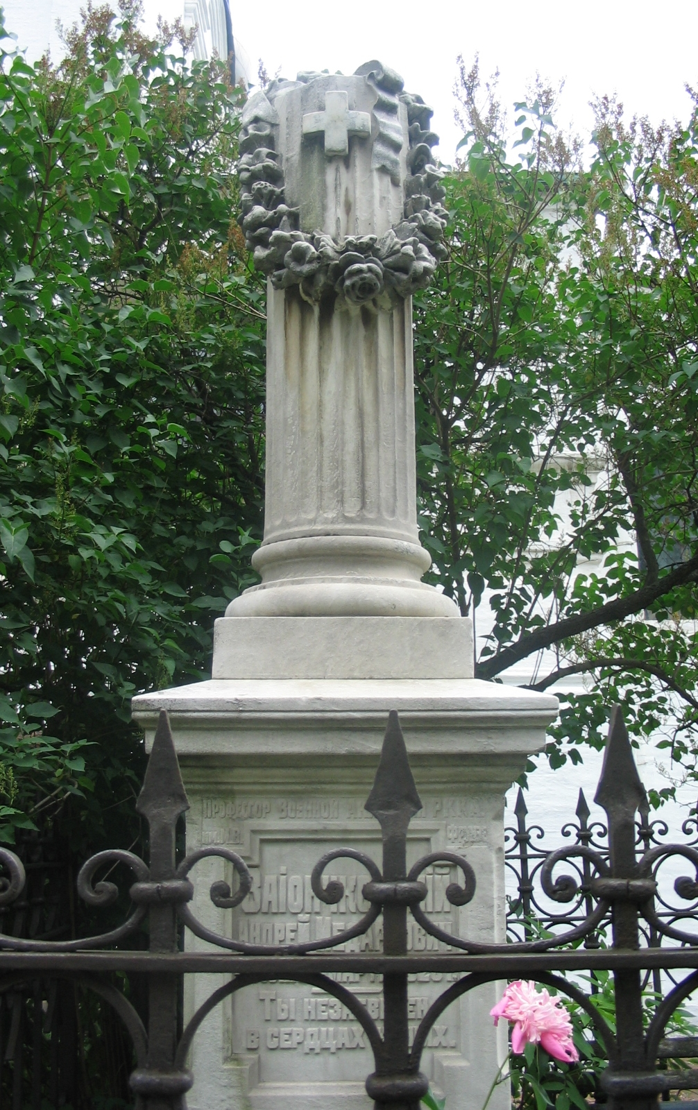 Могила Зайончковского